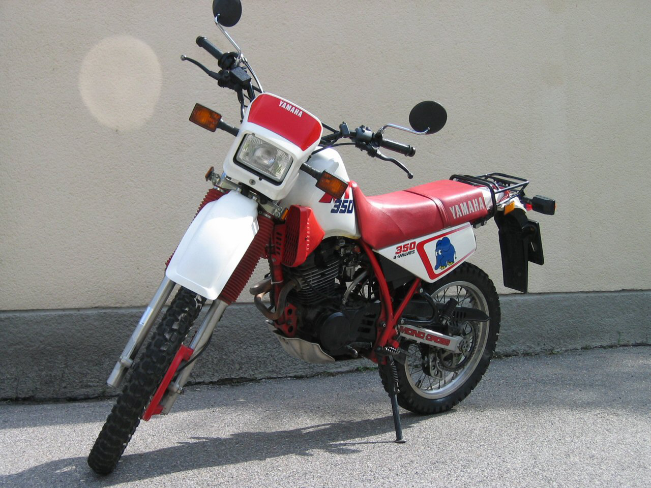 Yamaha XT350